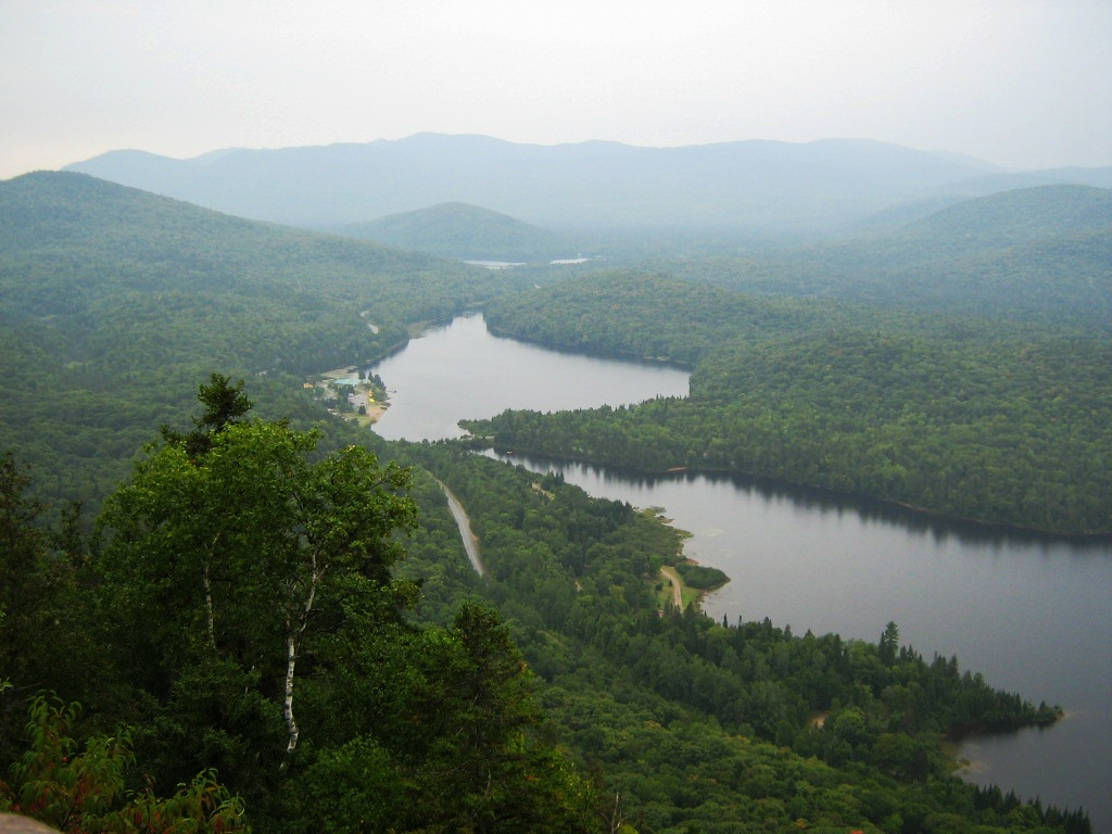 Lac Monroe dans le Parc national du Mont-Tremblant